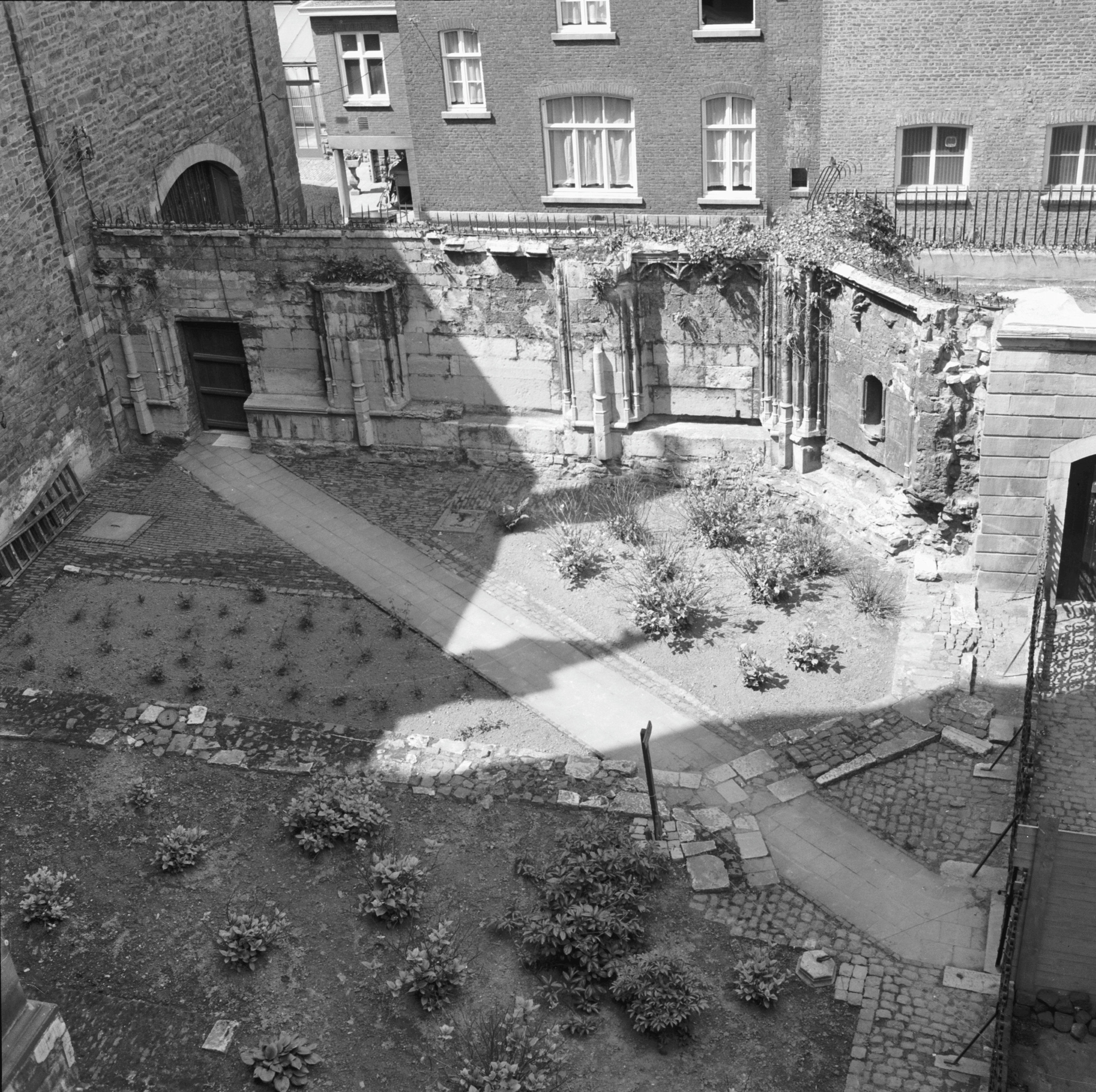 Maastricht, Sint-Servaaskerk: resten Koningskapel